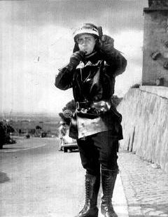 Screenshot Alberto Sordi, film Il vigile (1960) de Luigi Zampa Licensing Categoria:Immagini di Alberto Sordi